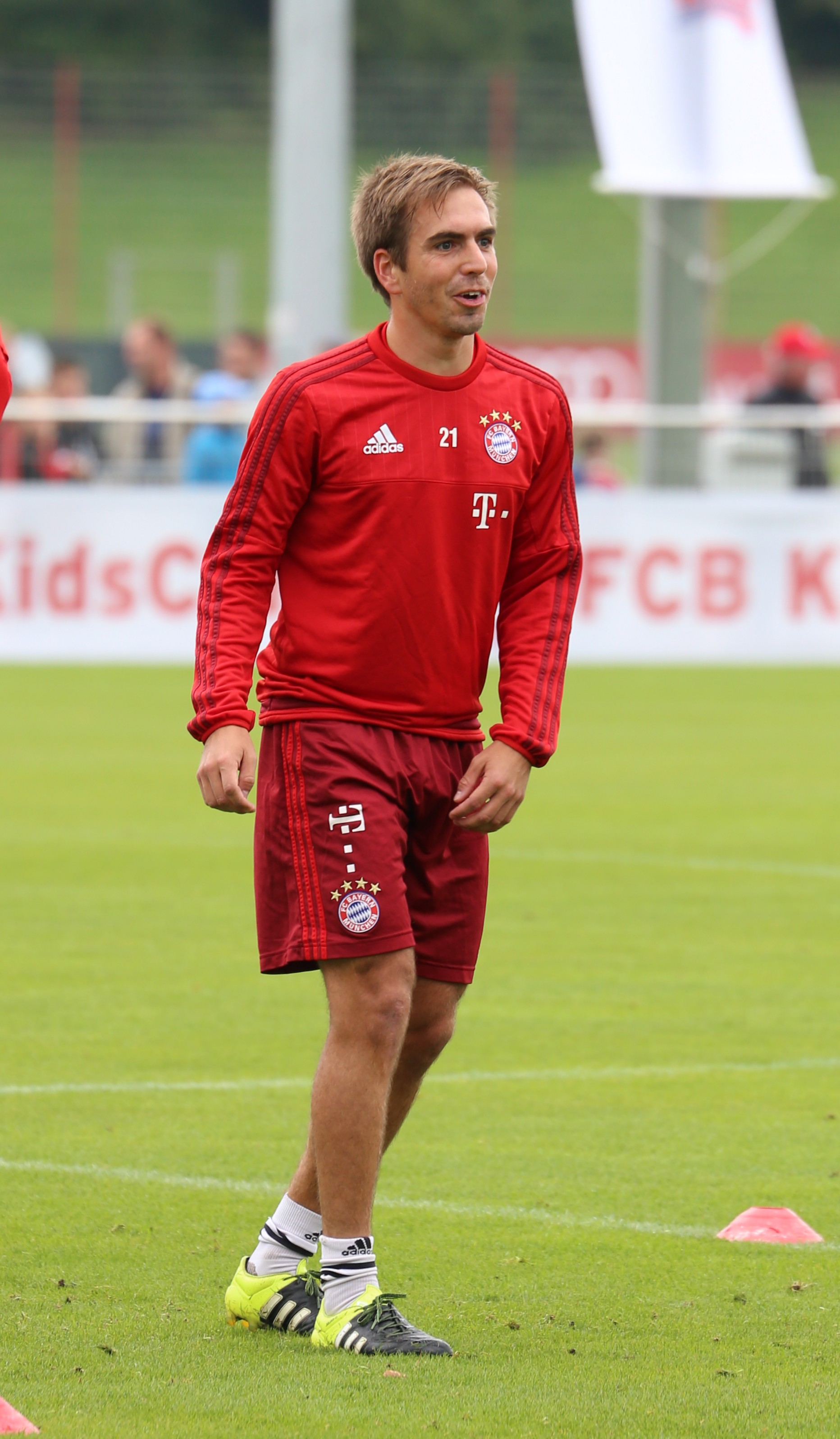 Philipp Lahm beim Training auf dem Gelände des FC Bayern München